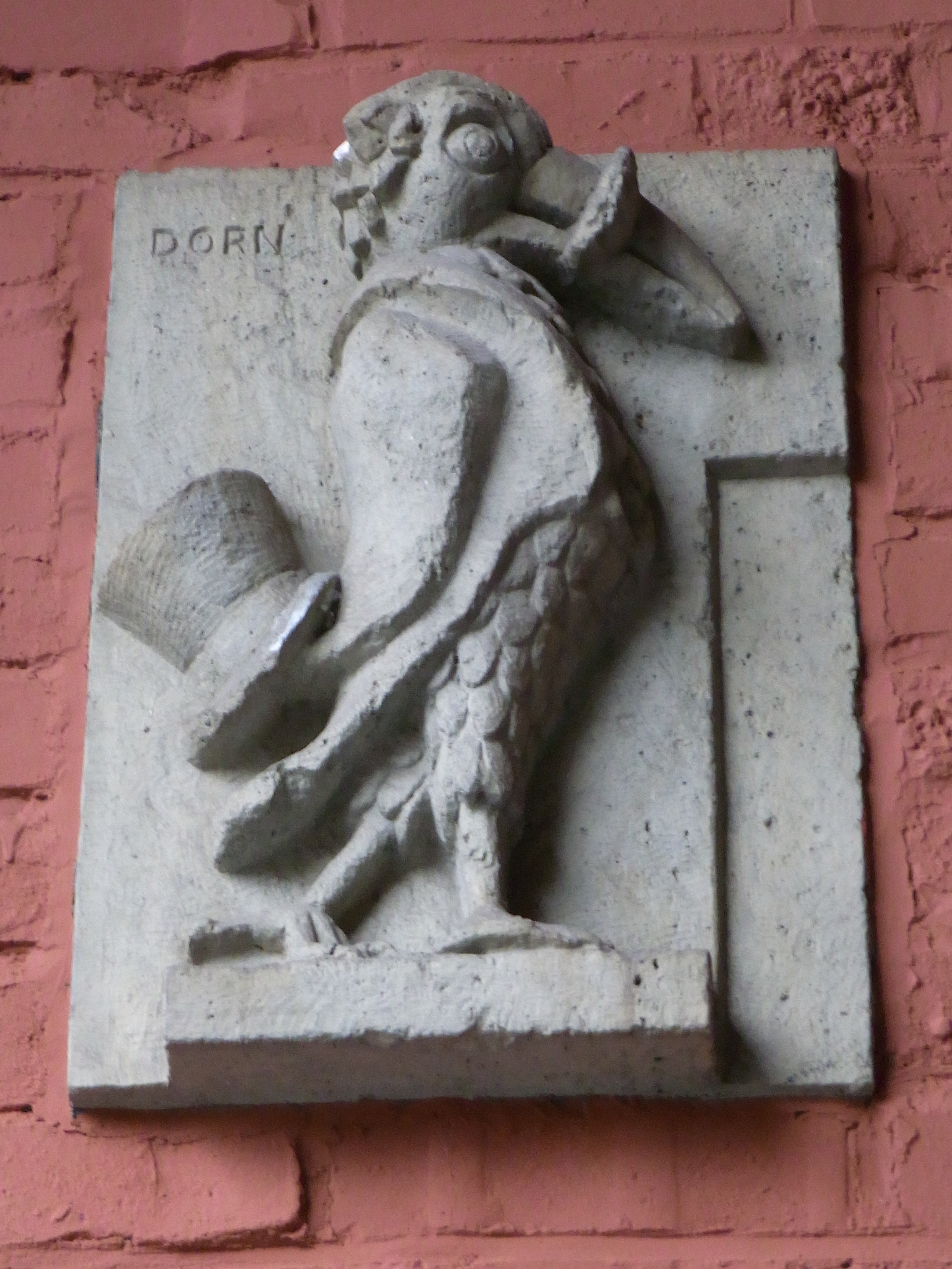 Tag des offenen Denkmals 2010: Hagen Cunosiedlung, Relief von Hans Dorn